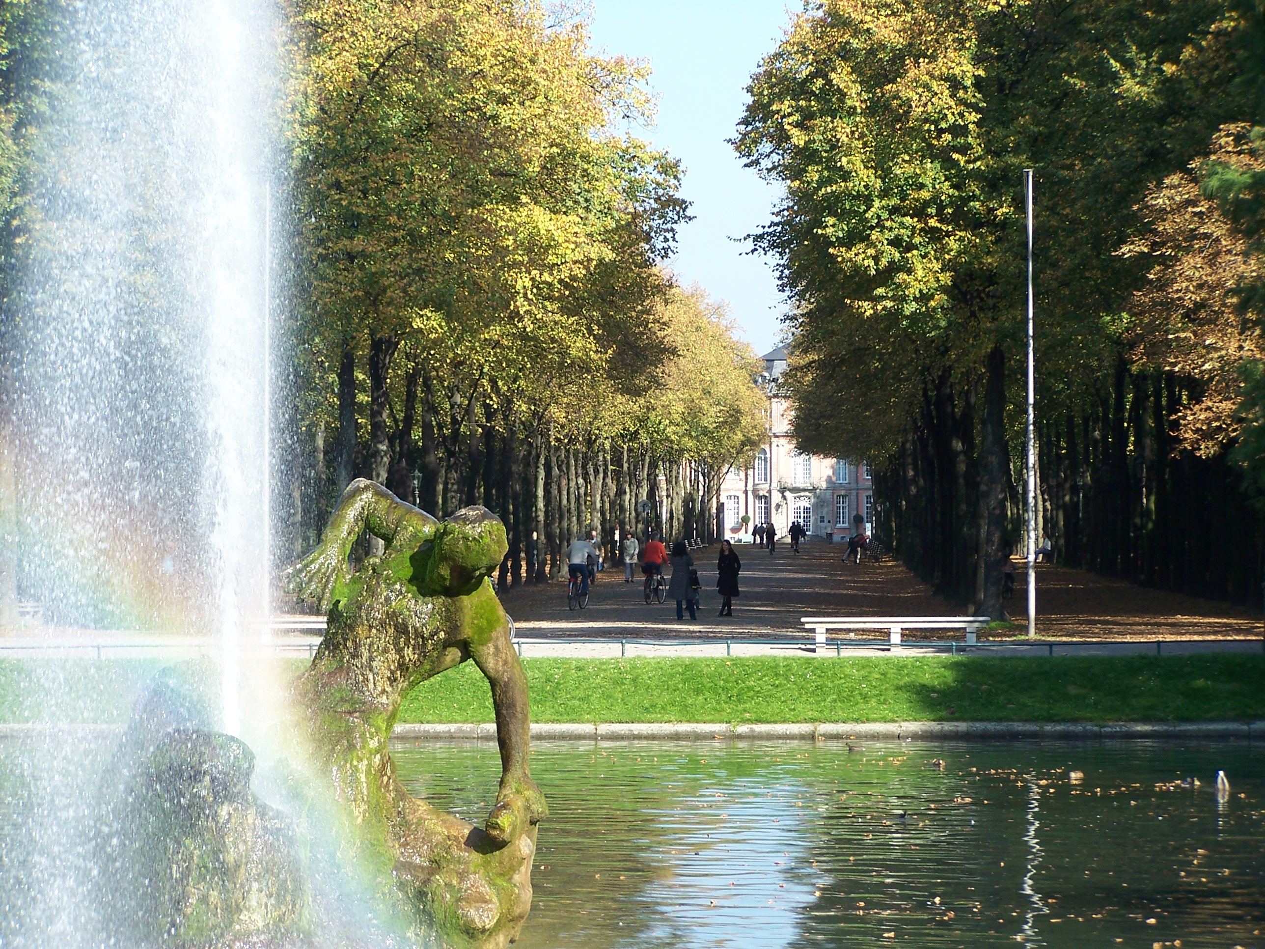 Gröner Jong im Hofgarten Düsseldorf - Copyright